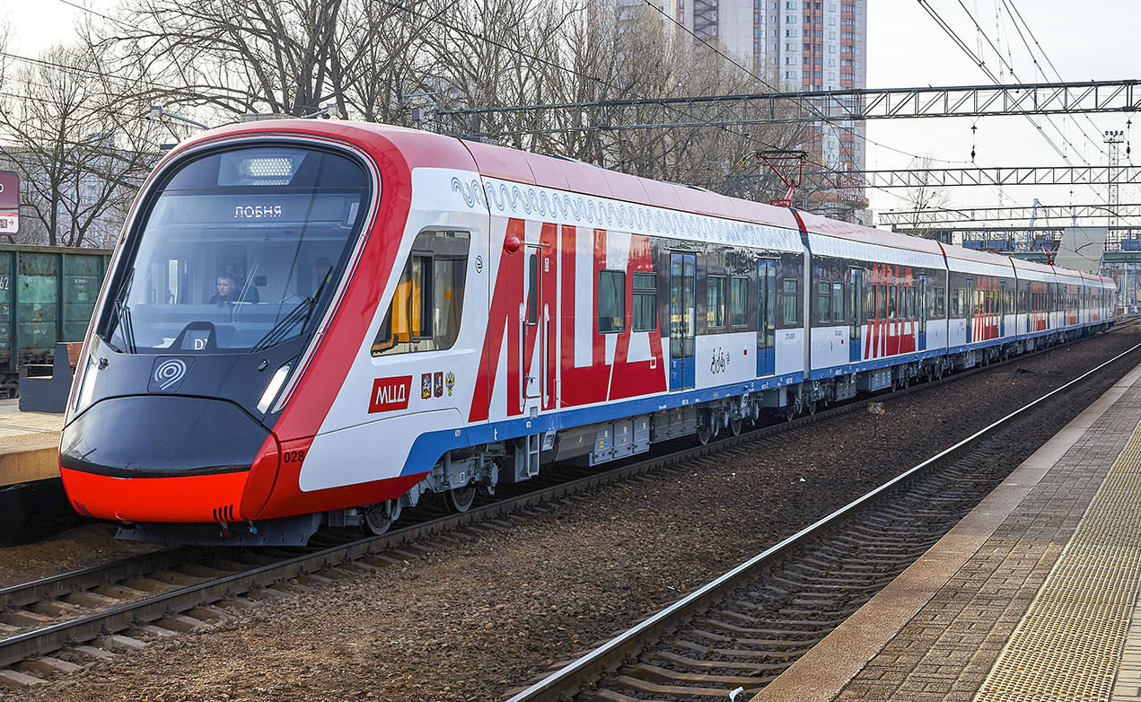 Электропоезд ЭГ2Тв-028 на станции Одинцово